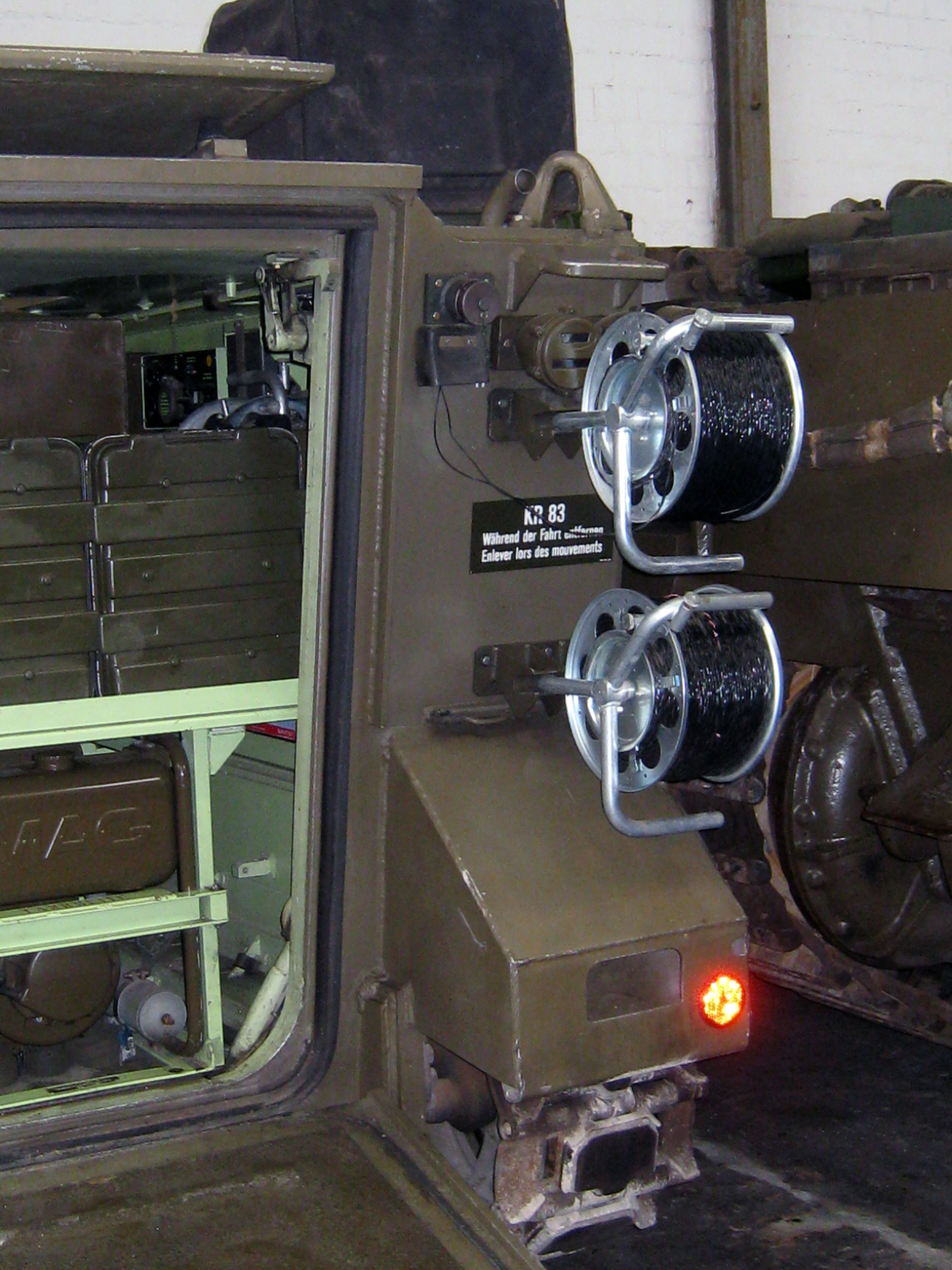 Uebermittlungspanzer 63 im Militärmuseum Full